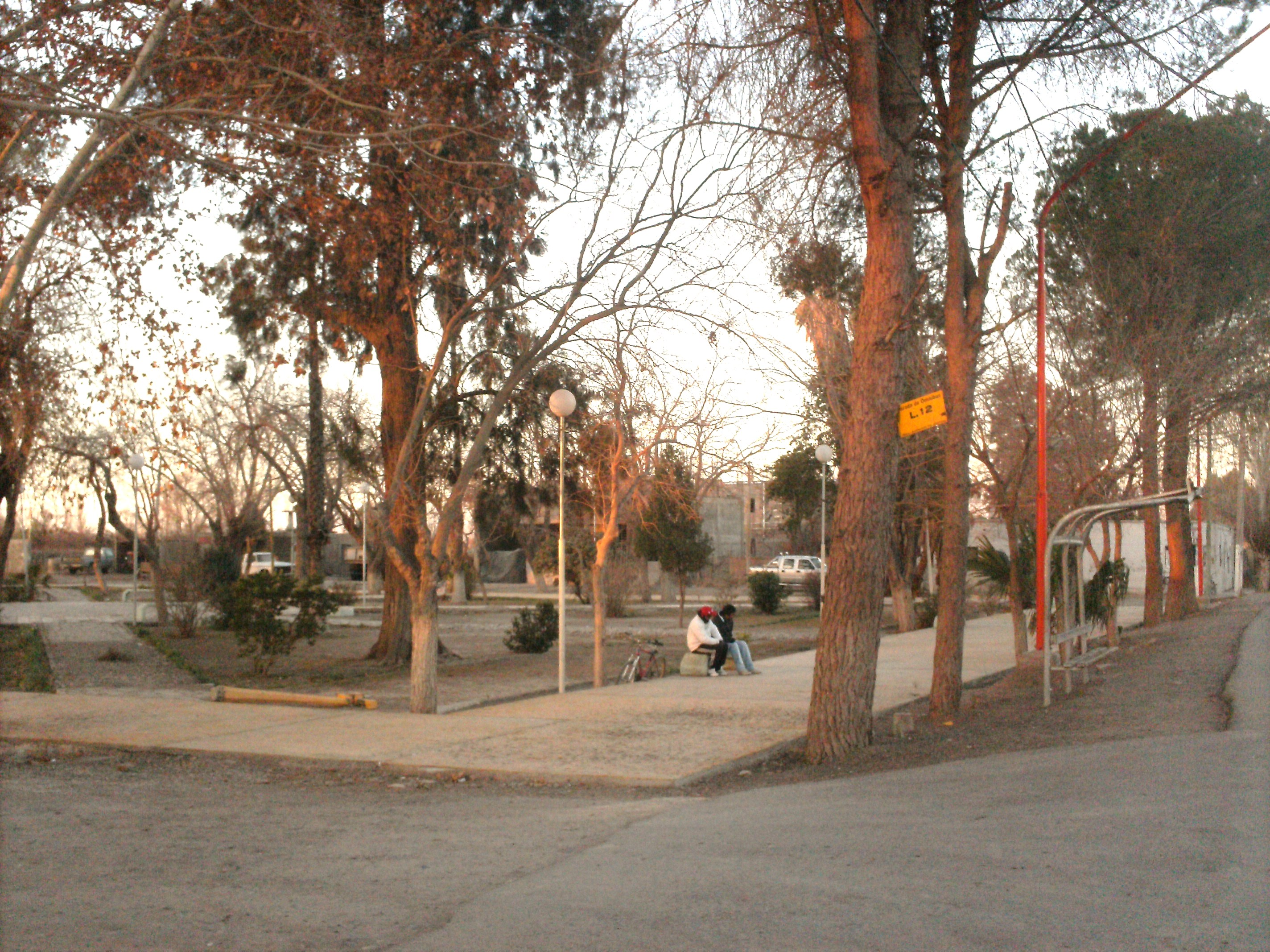 Plaza principal de Altos de Sierra